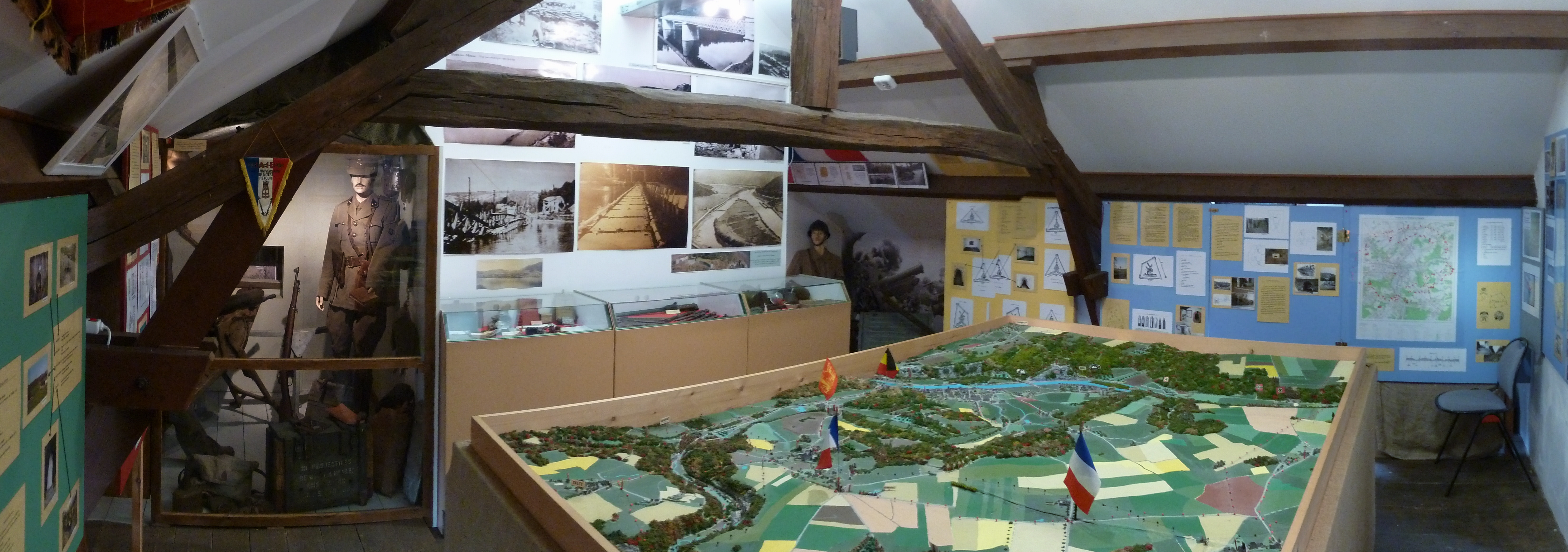 Plan et forts de Namur